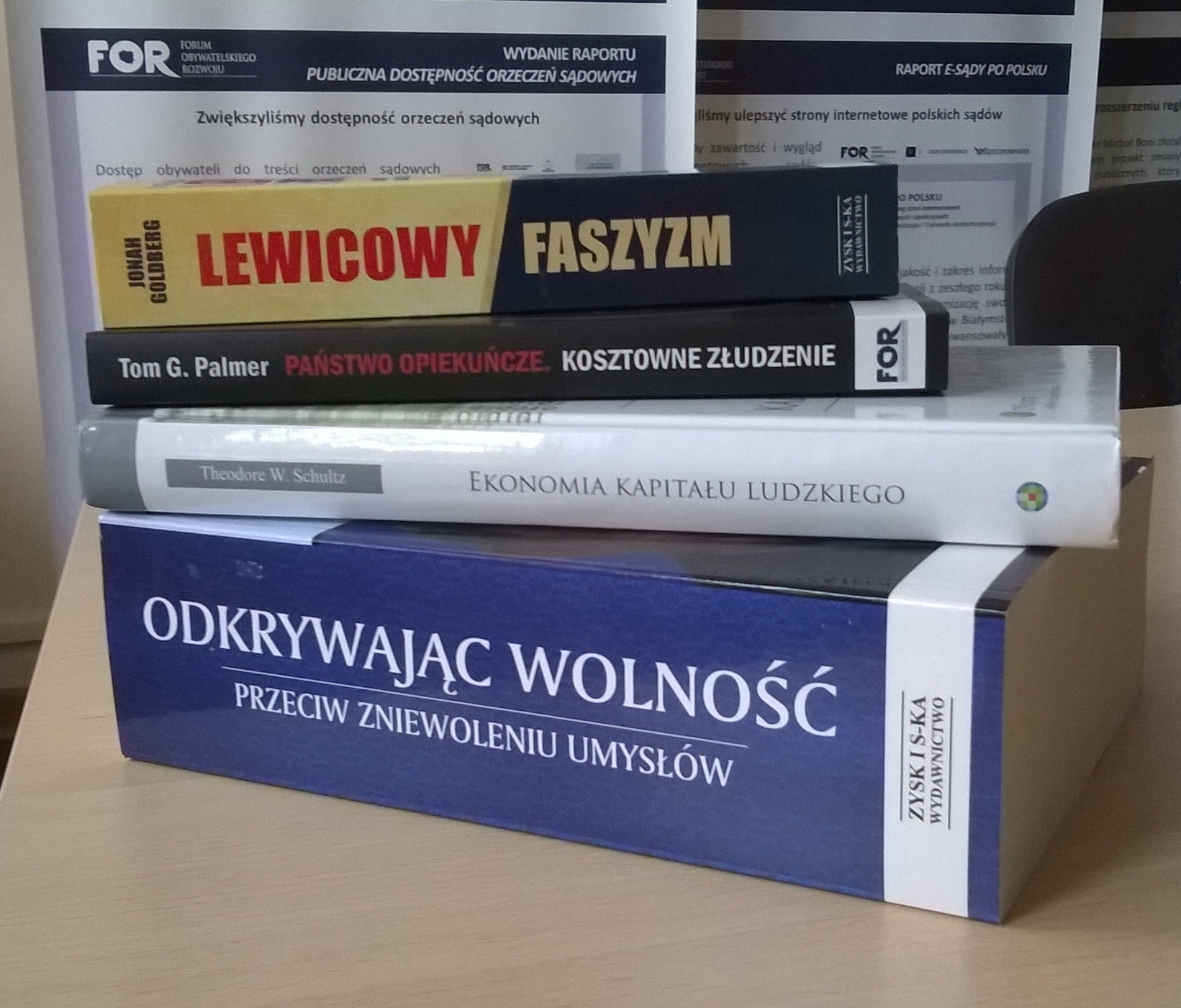 Niektóre z książek polecanych przez FOR